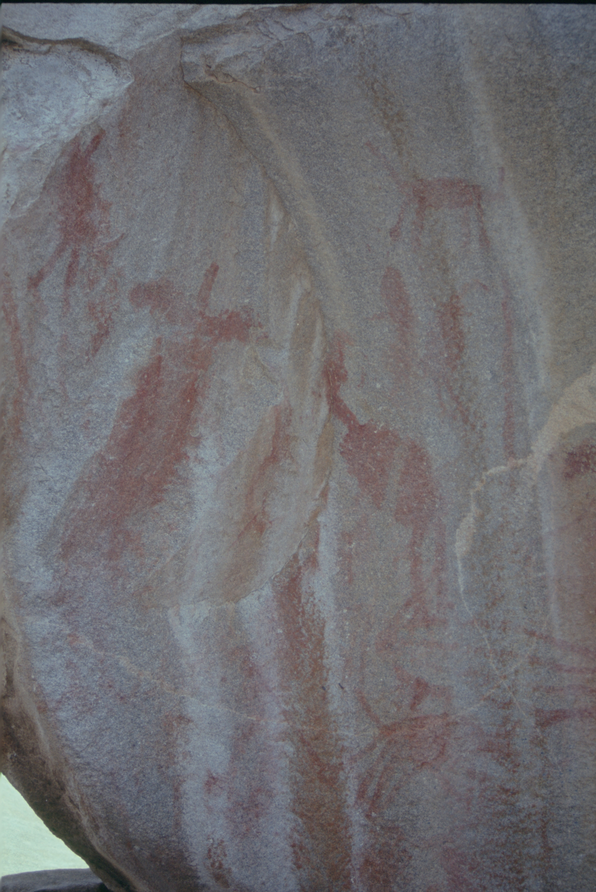 Pintura rupestre aa margem de acude em Santana do Matos, RN, Brasil.